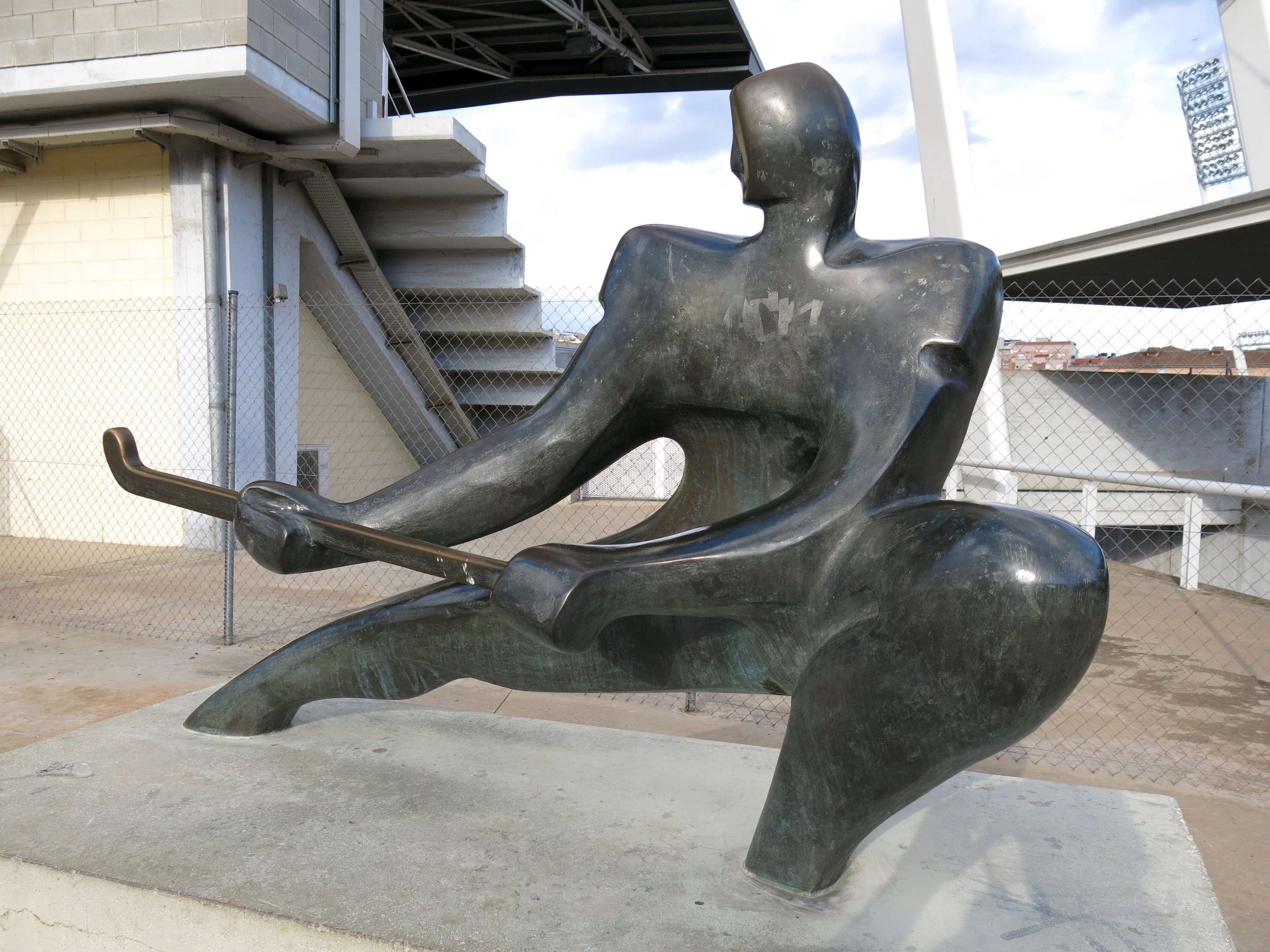 Hoquei, de Rosa Serra, davant l'Estadi Olímpic (Terrassa)